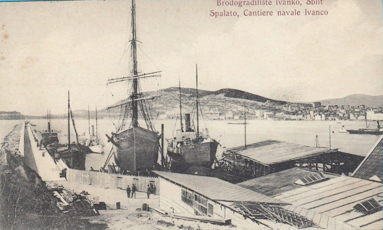 splitsko brodogradilište novoga vremena bilo je Ivanko(1893). od strane Dinka Ivanka u gradskoj luci podno Katalinića briga